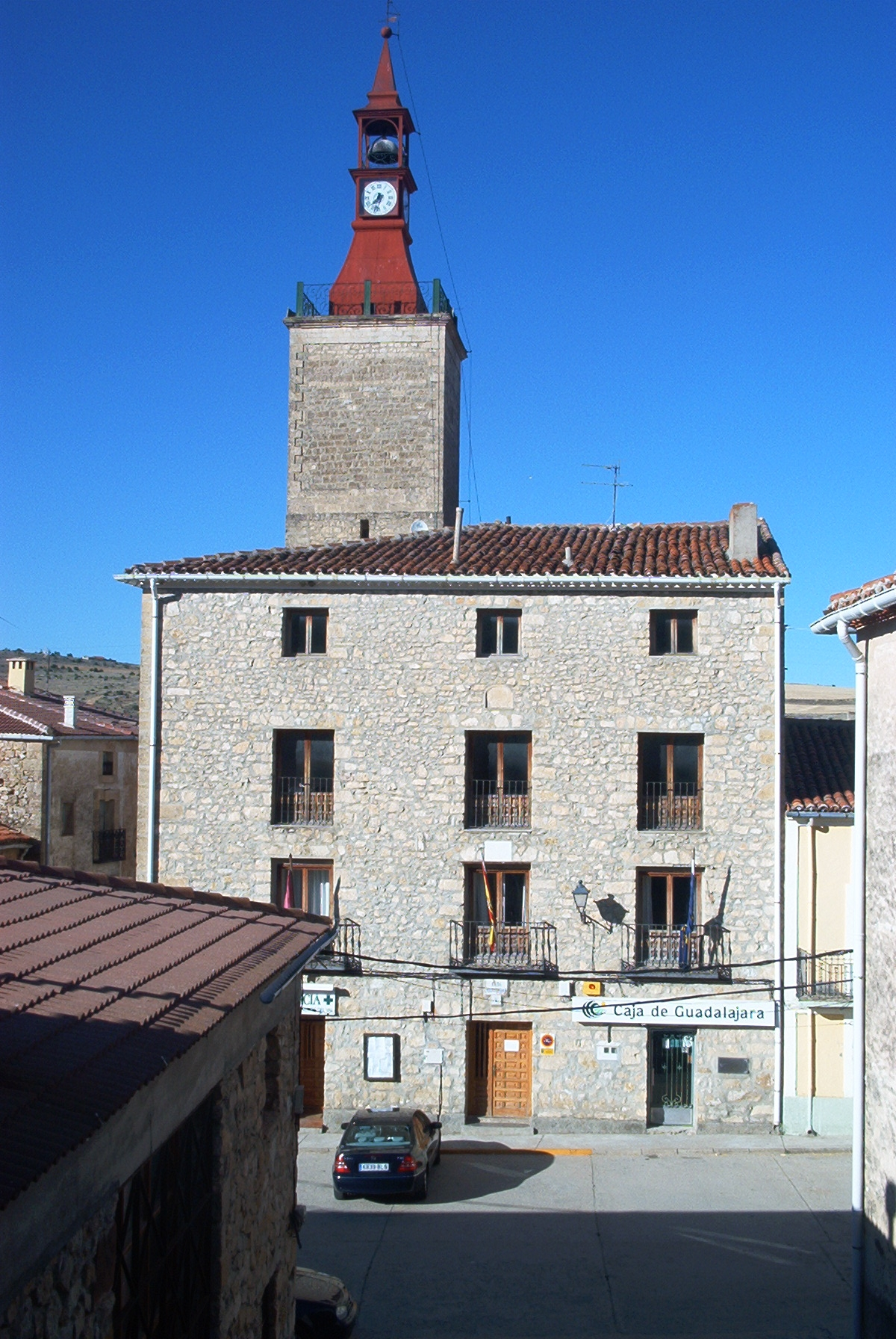 El Ayuntamiento y la Torre del Reloj